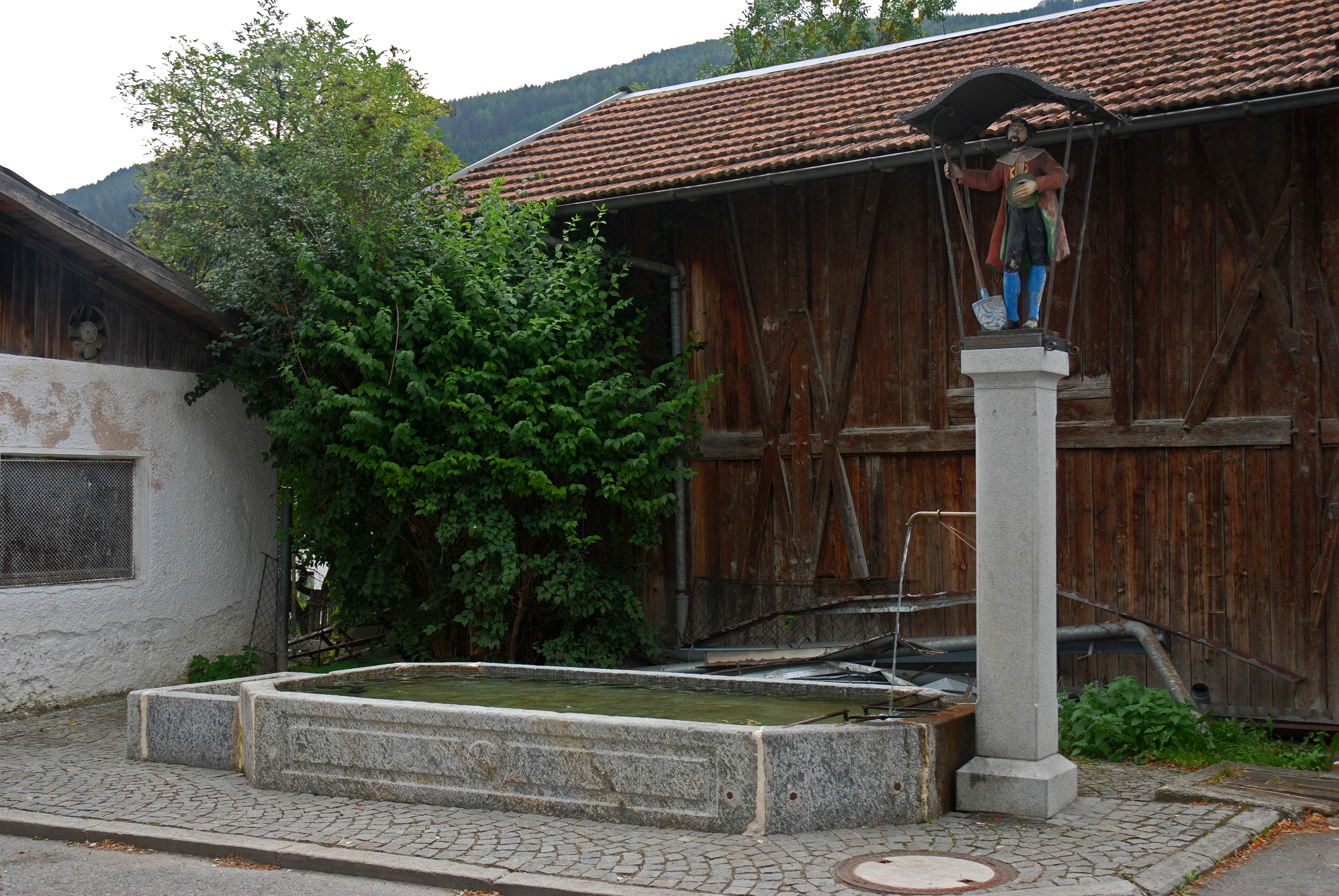 Isidorbrunnen, Götzens Tirol